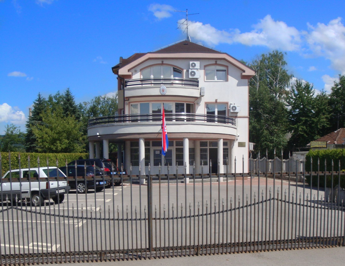 Генерални_конзулат_Републике_Хрватске_у_Бањалуци